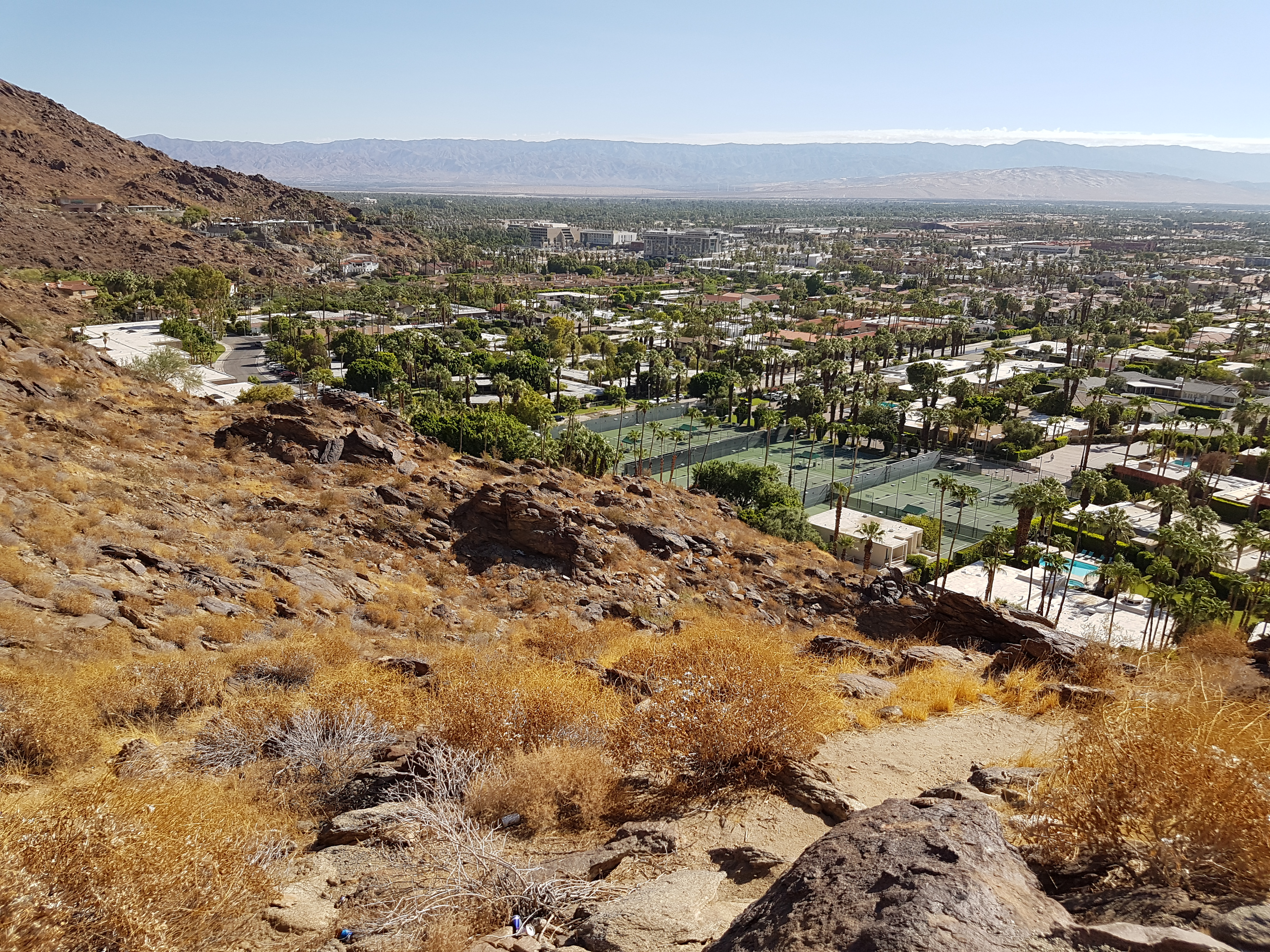 Im Vordergrund befinden sich einige Villen, im Hintergrund das Zentrum von Palm Springs